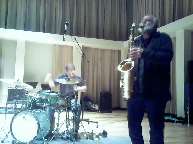 Peter Brötzmann on tenor saxophone @ MN Sur Seine 2OO6.